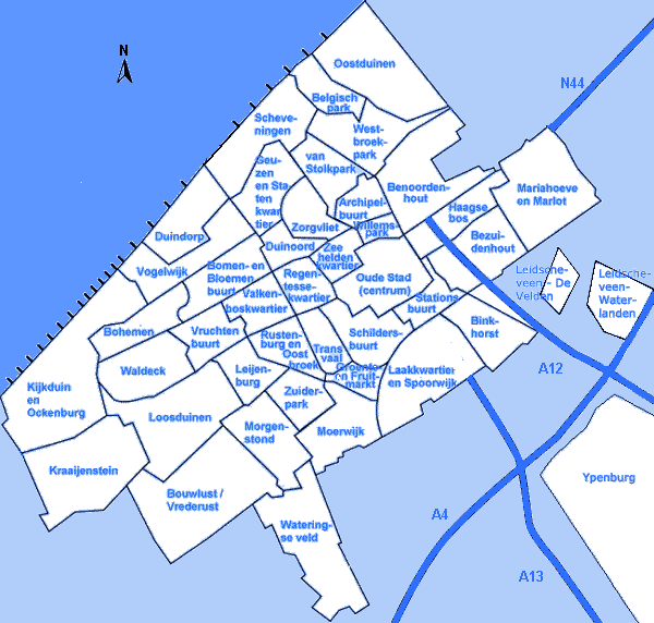 Haagse wijkindeling, bewerkt Gebruik toegestaan met bronvermelding Dit is een kaart met de wijkindeling van een gemeente in Nederland, afkomstig uit de CBS publicatie Gemeente op Maat of gebaseerd op de vrijgegeven geografische ESRI-bestanden op de CBS-website [1]. Site disclaimer: Voor alle digitale geometrie geldt dat publicatie van de kaart is toegestaan, mits het CBS en de Topografische Dienst Kadaster als bronnen worden vermeld. Het gebruik en verdere verspreiding van dit bestand is toegestaan, zolang de bron van het kaartmateriaal Centraal Bureau voor de Statistiek (Voorburg/Heerlen) / Topografische Dienst Kadaster wordt vermeld. This image can only be redistributed when mentioning the source, Centraal Bureau voor de Statistiek, Voorburg/Heerlen, Topografische Dienst Kadaster.